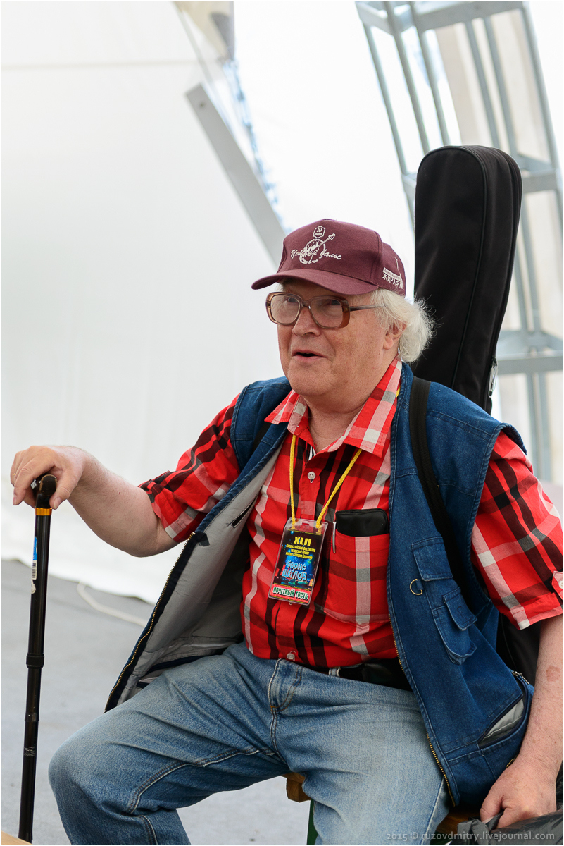 Борис Щеглов, Грушинский фестиваль 2015